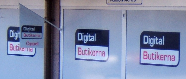 byggnad